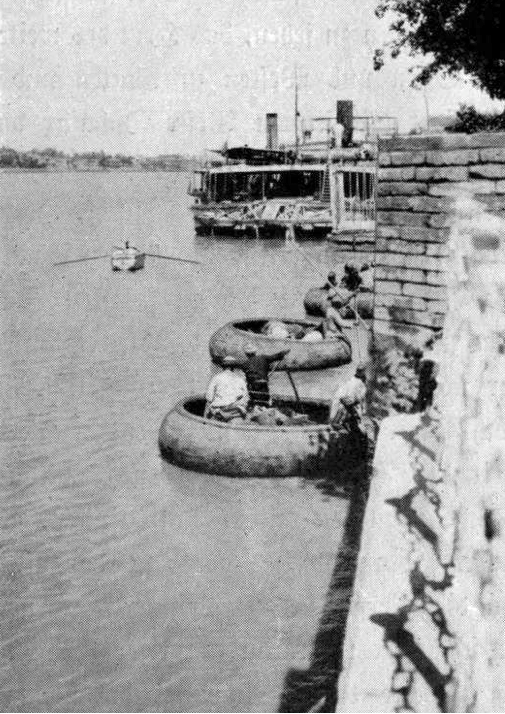 Baghdad, Iraq